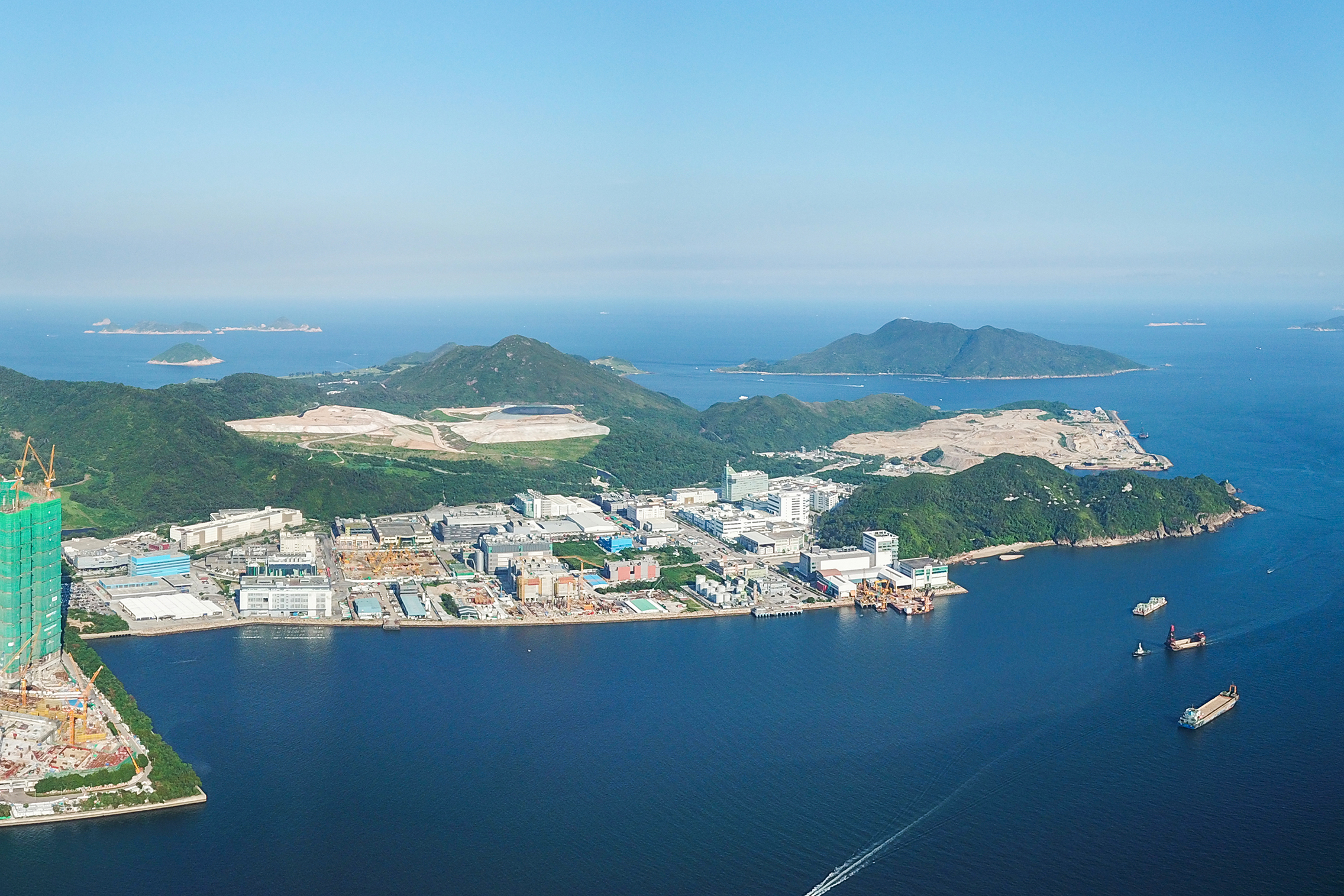 Tai Chek Sha